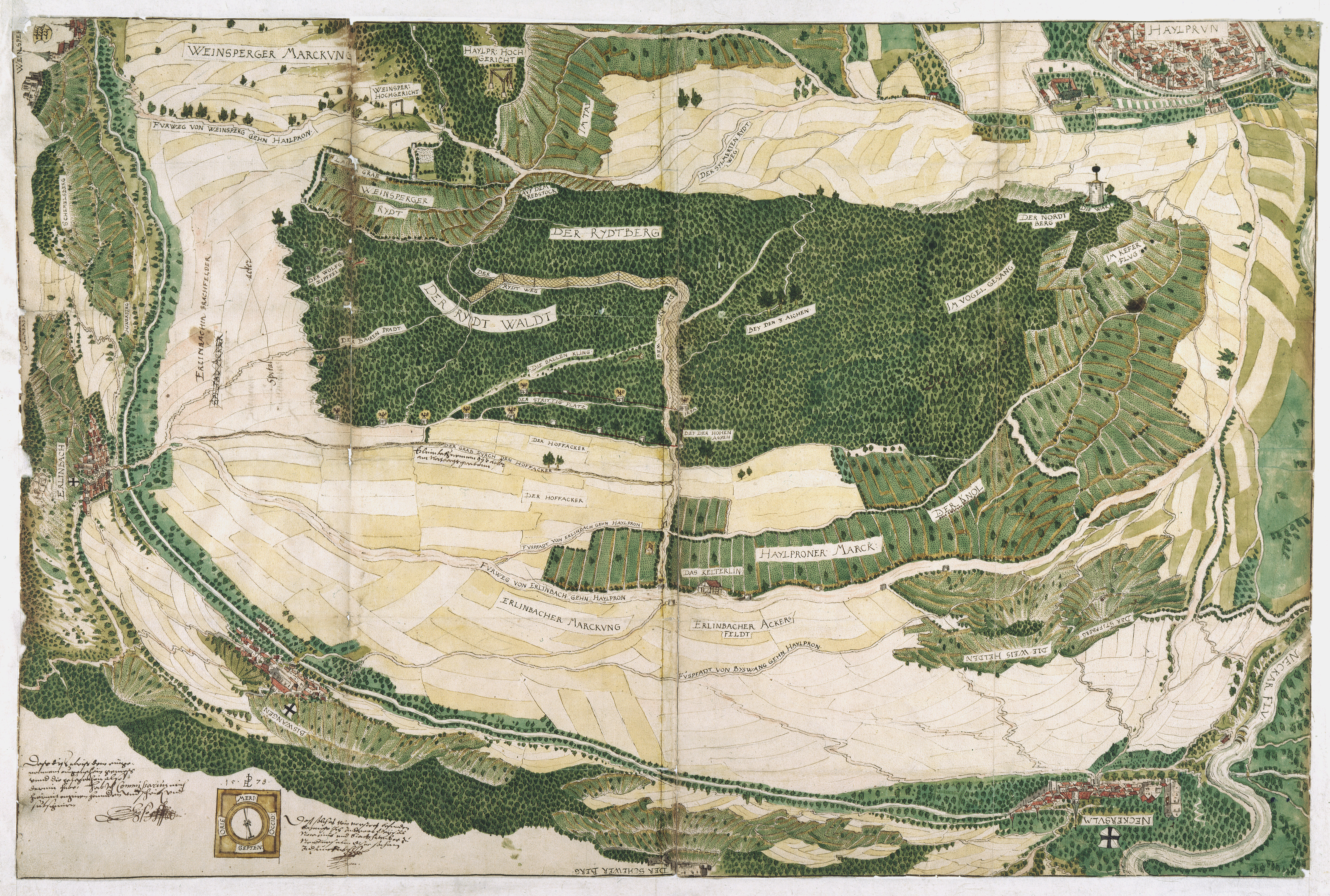 Territorium der Reichsstadt Heilbronn von Hans Peter Eberlin, 1578 (HStAS C 3 Bü 4290), , Gesamtansicht